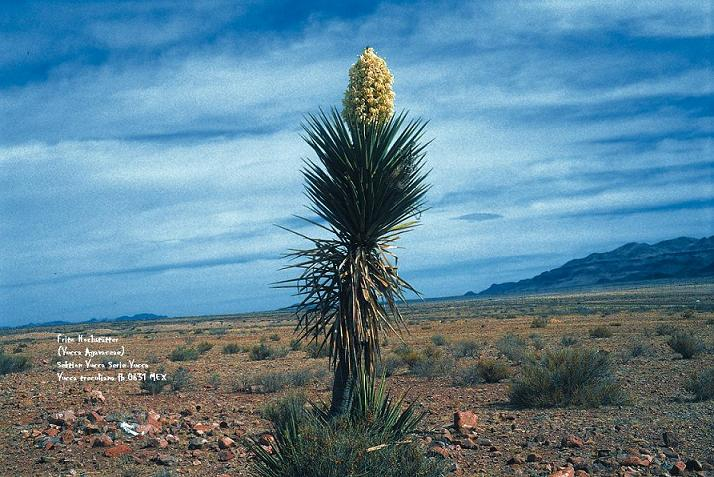 Spezies mit nicht aufreißenden Früchten. Sektion Yucca Serie Treculianae Yucca treculiana fh 0631 Mexico.